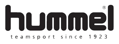 Marca deportiva Hummel